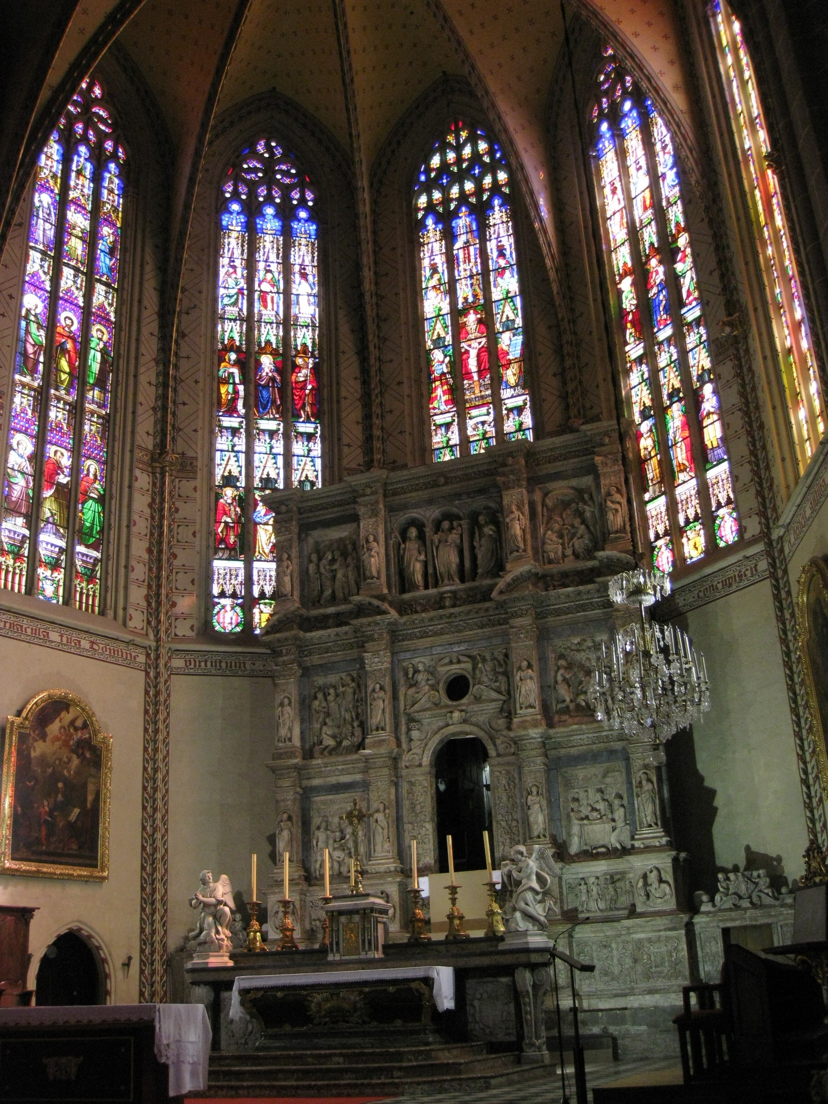 Catedral de Perpinyà, altar major barroc de marbre, de Claudi Perret, dedicat a Sant Joan